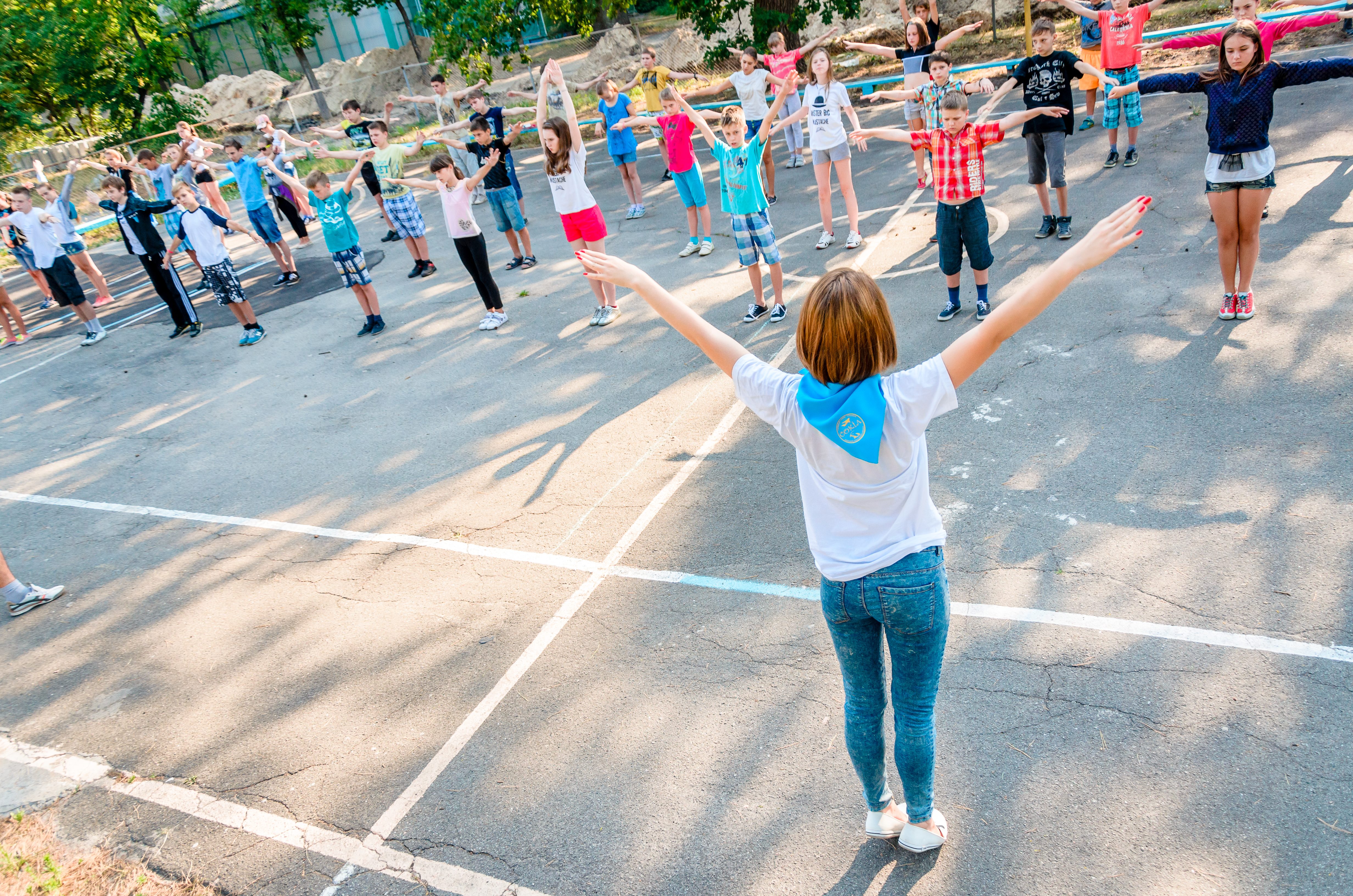 Зарядка